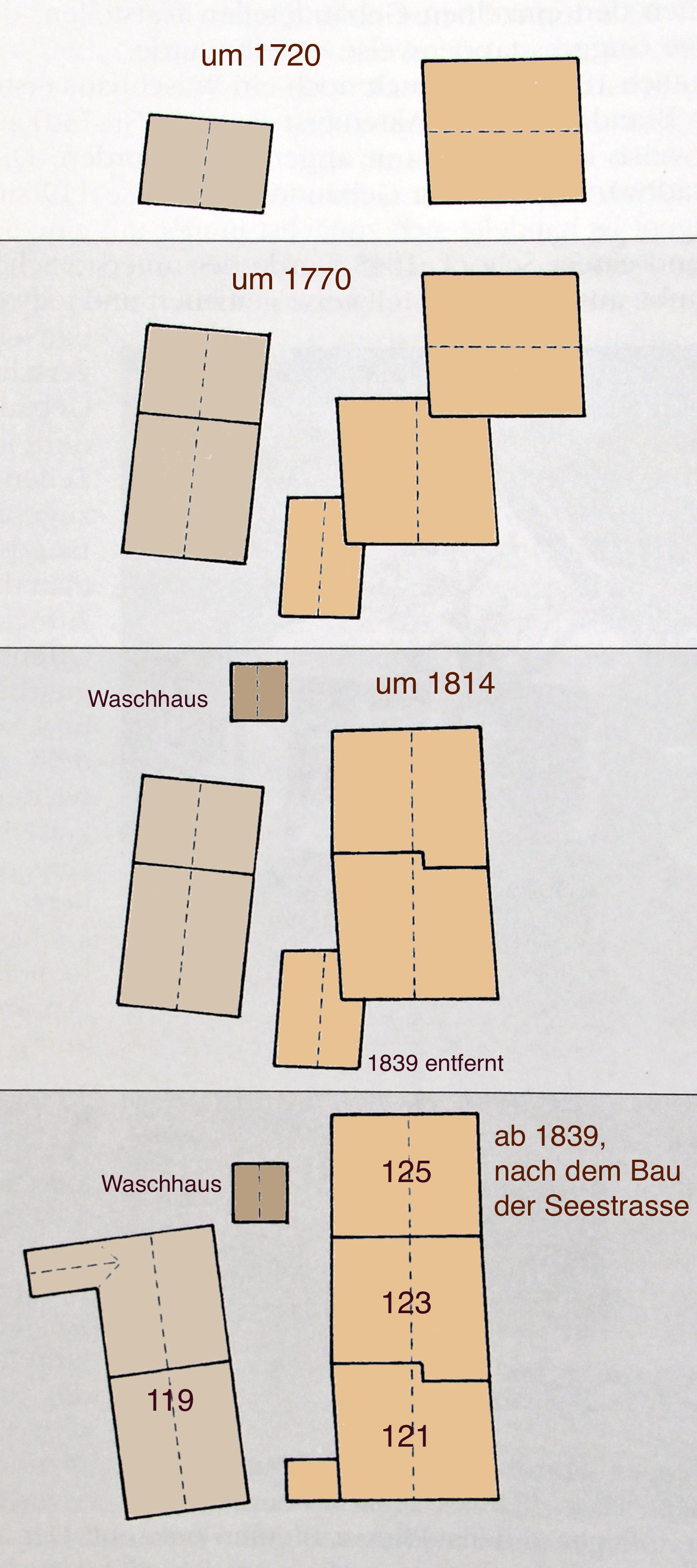 Gugger (Zollikon) Grundrsse im Lauf der Zeit